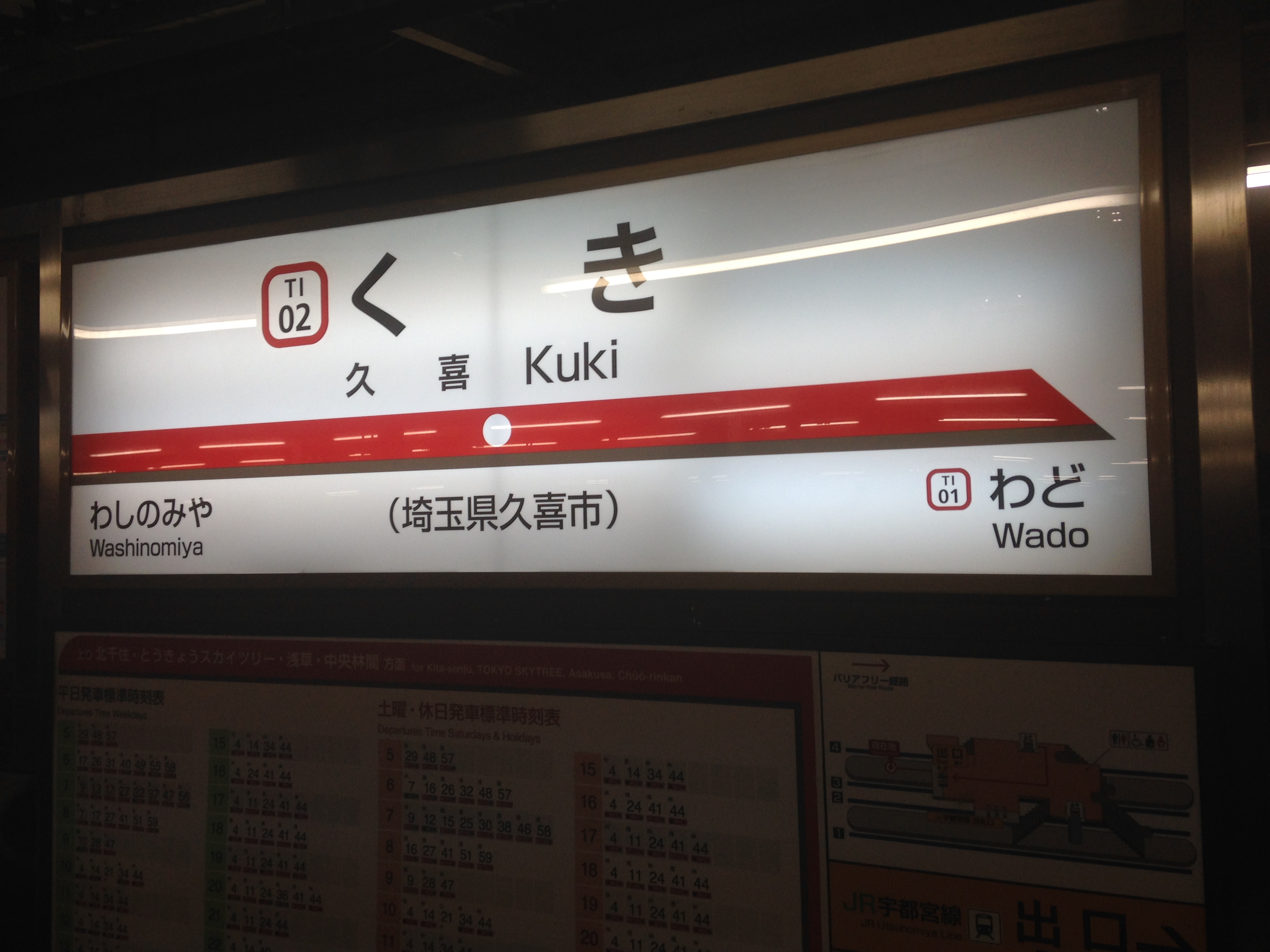 久喜駅(東武伊勢崎線)の駅名標